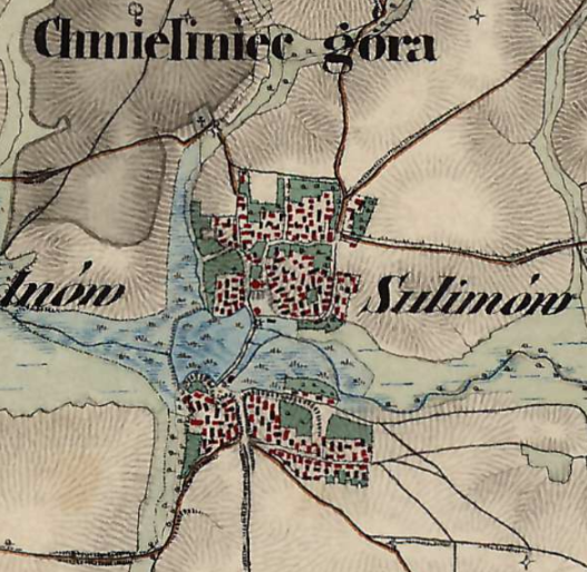 xix